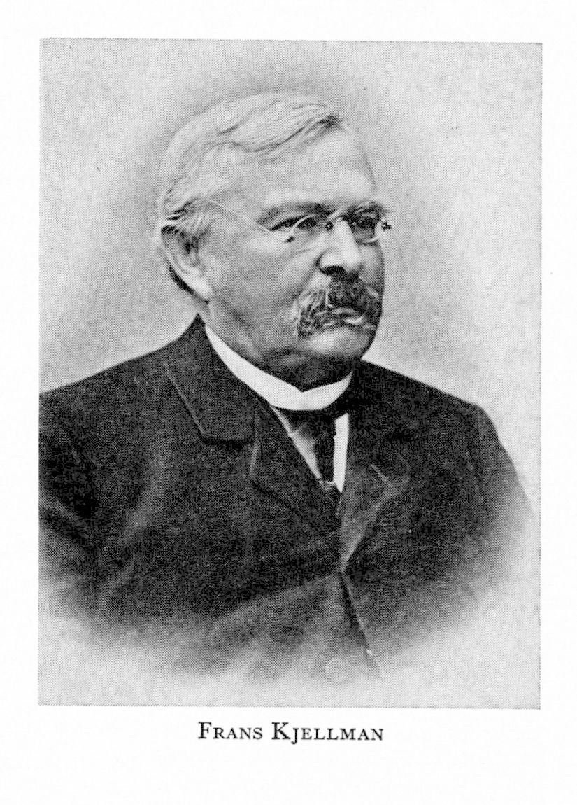 Франс Рейнгольд Челльман (швед. Frans Reinhold Kjellman; 1846—1907) — шведский ботаник.